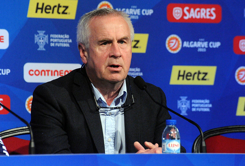 a_80_4759